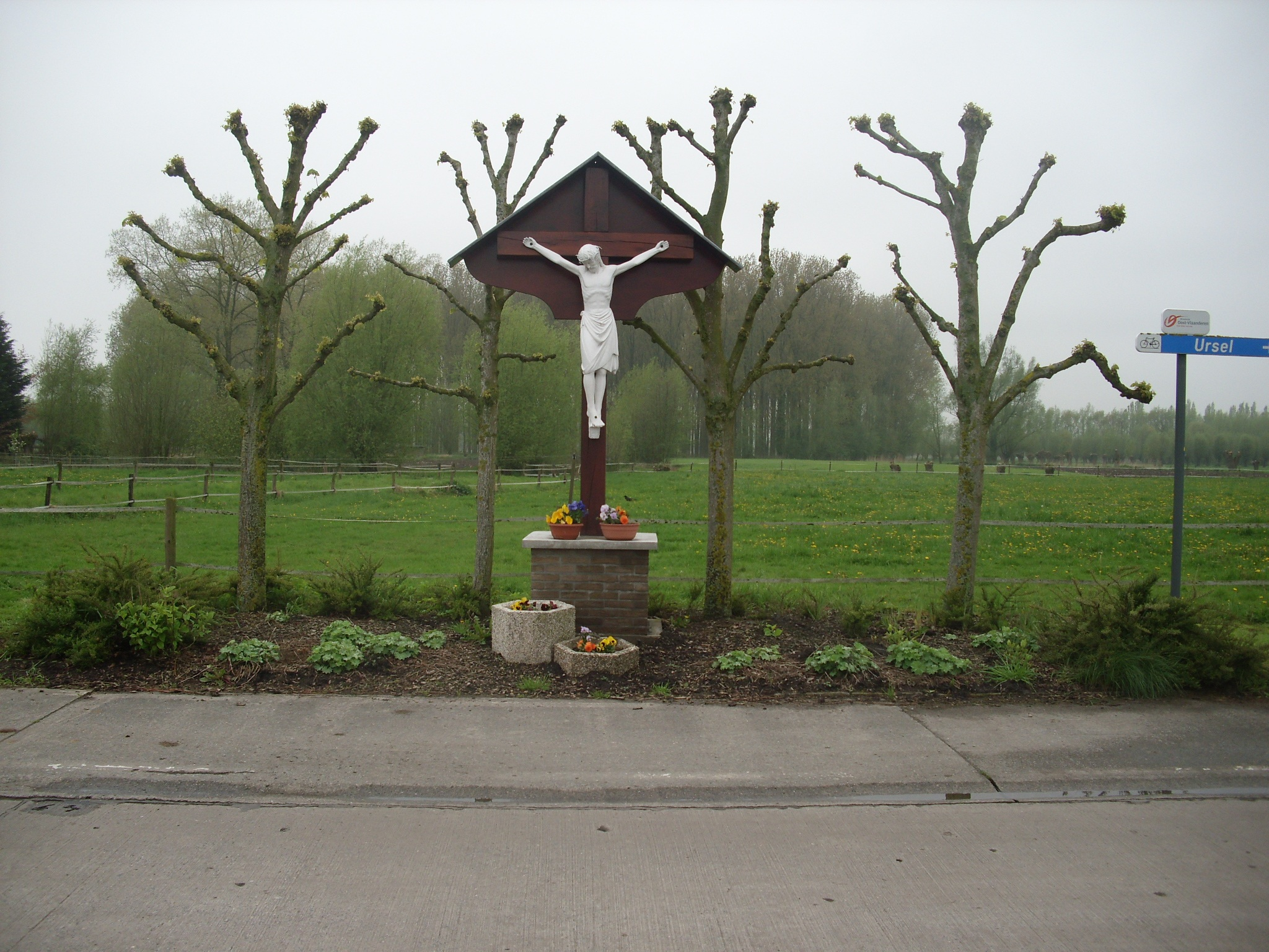 Kruisbeeld op de t-spitsing van de Vrekkemstraat met de Kruisstraat - Ursel - Knesselare - Oost-Vlaanderen - België